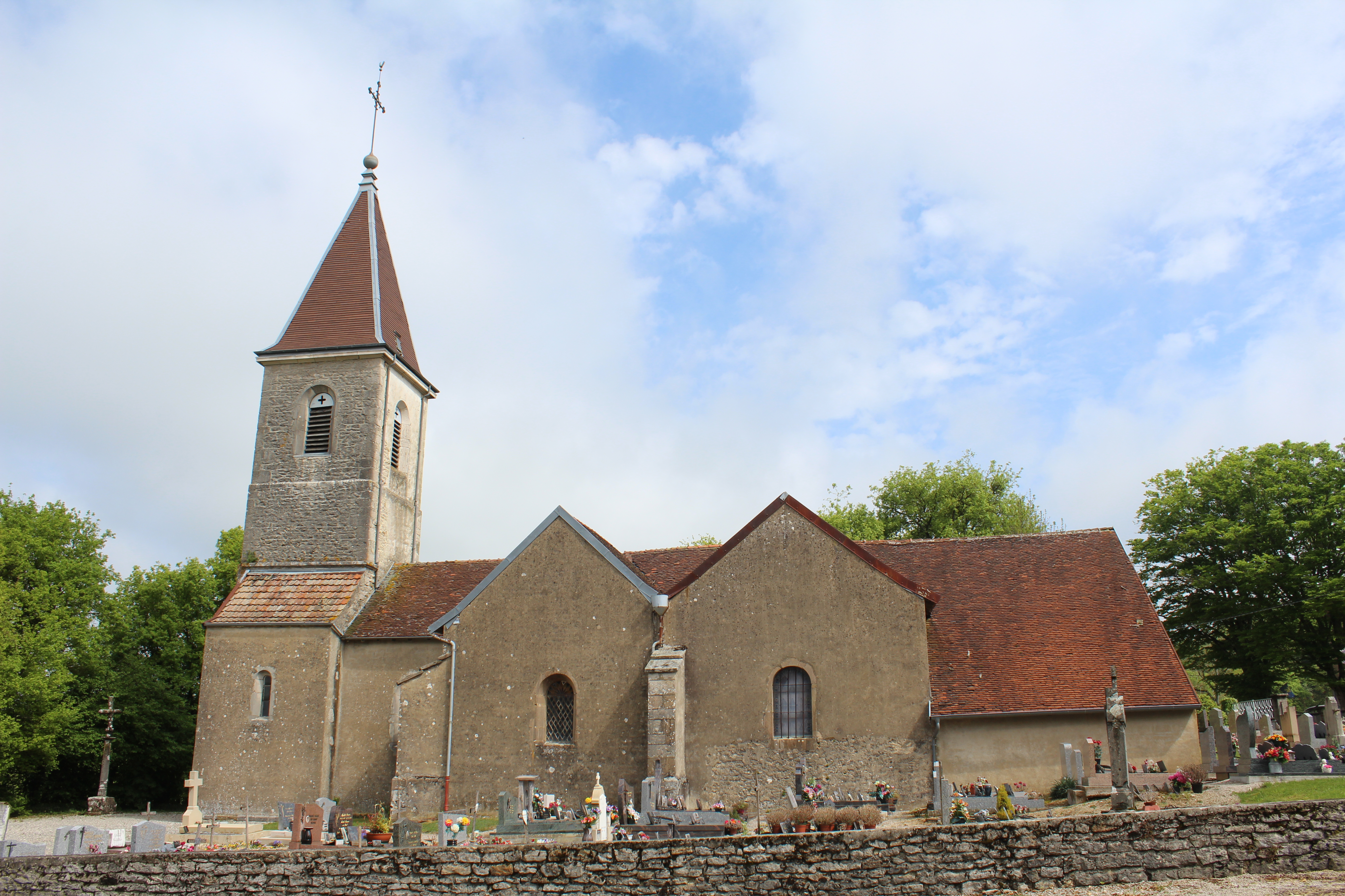 Église Saints-Pierre-et-Paul de Rosay, Jura.